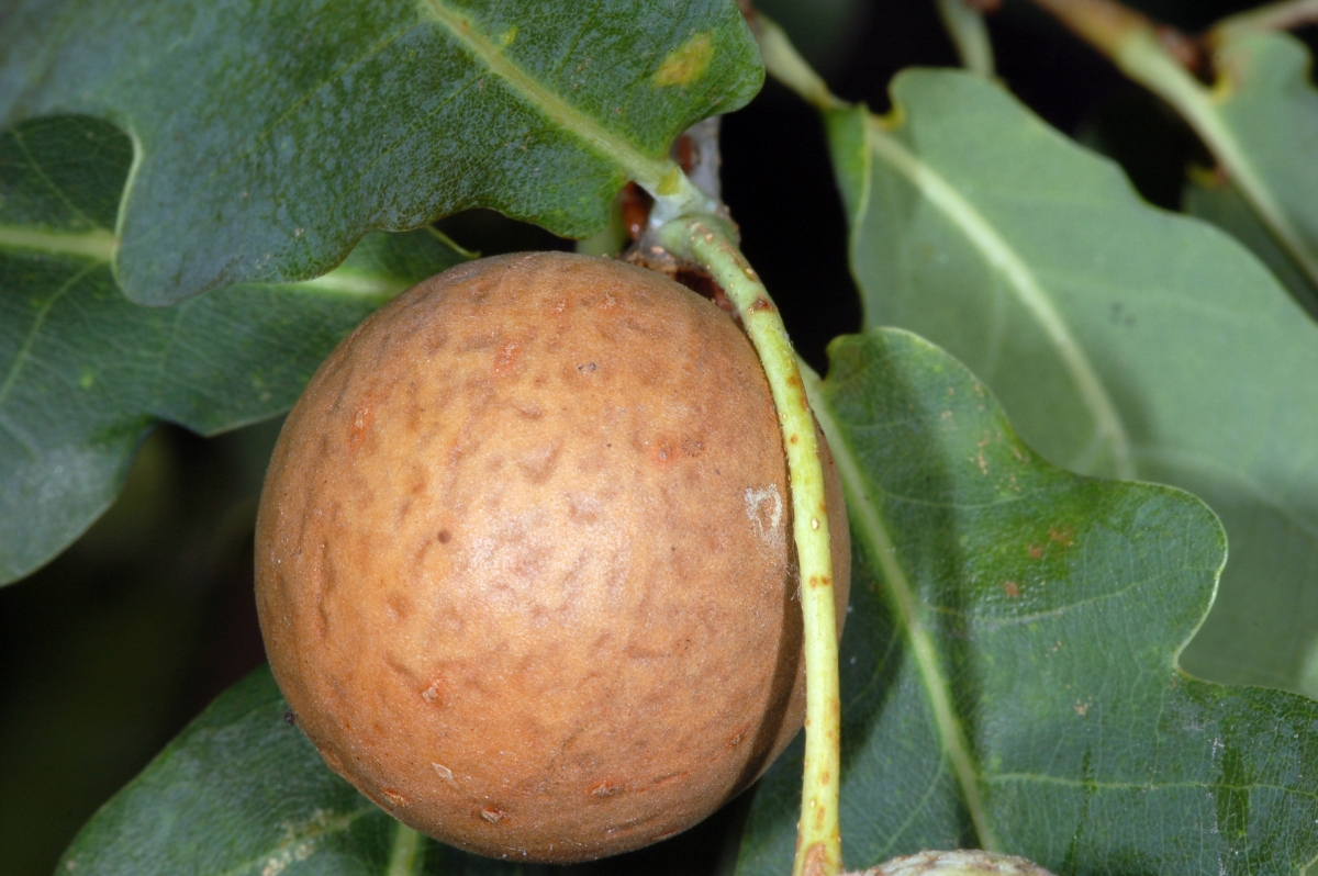 Schwammkugelgallegalle (Andricus kollari) an Quercus robur, Stromtrasse neben der Startbahn West, Kelsterbach, Hessen, Deutschland